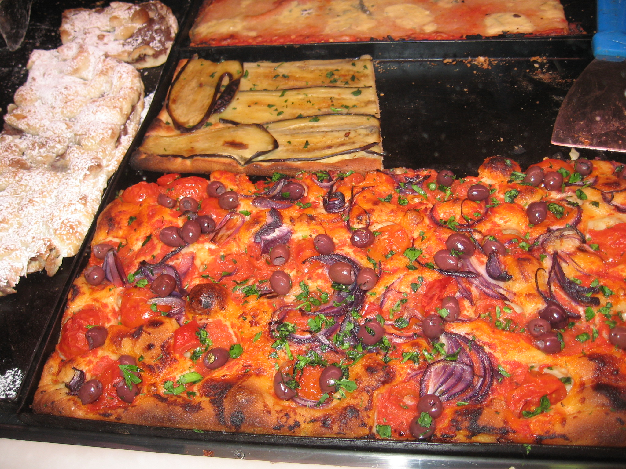 פיצה כשרה מגטו רומא Pizza kasher from ghetto roma